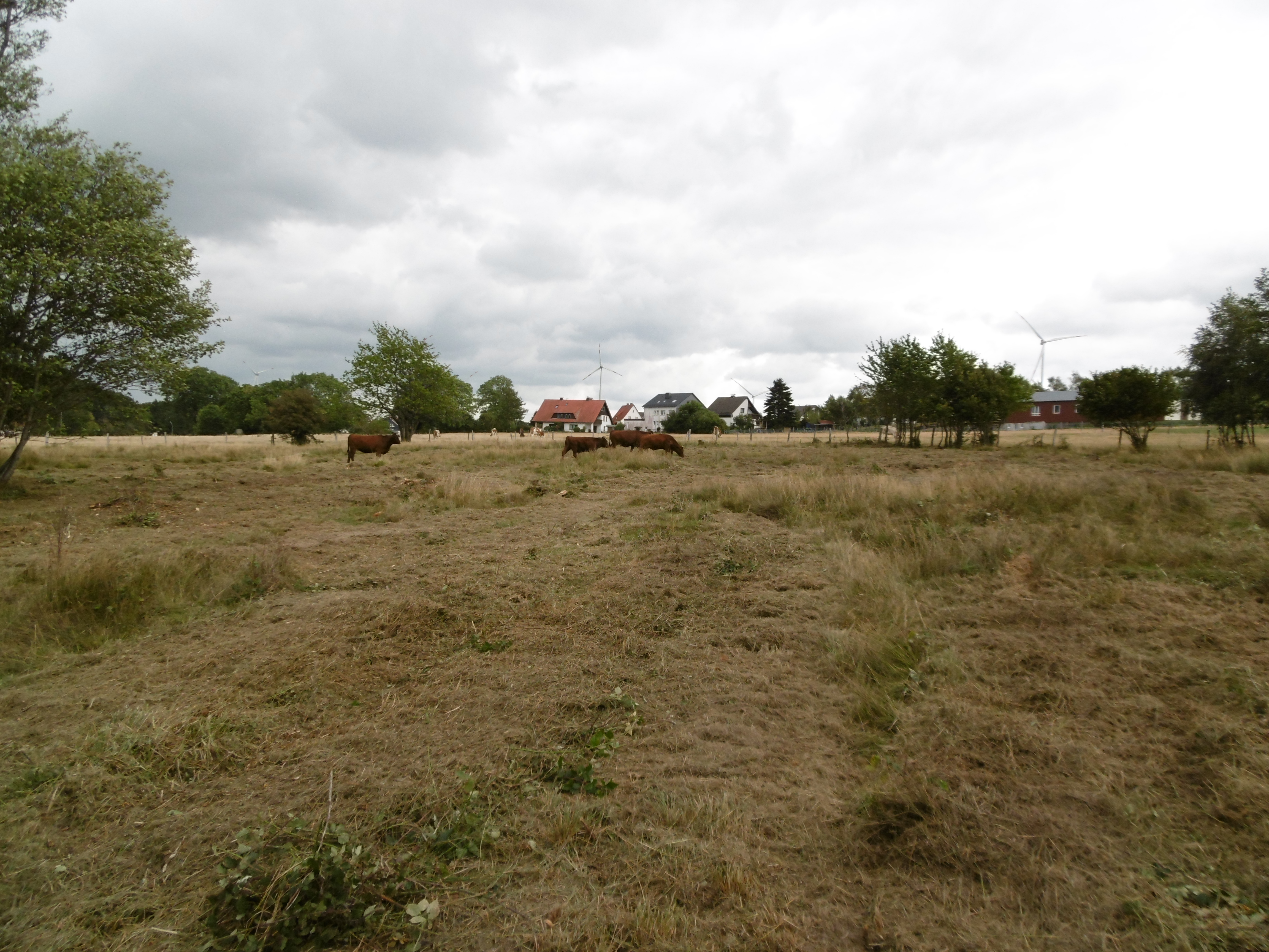 Bereich der vom Verein für Natur- und Vogelschutz im Hochsauerlandkreis angekauften Fläche im Landschaftsschutzgebiet Feuchtgrünland um Rixen mit Rotem Höhenvieh und Rixen im Hintergrund.